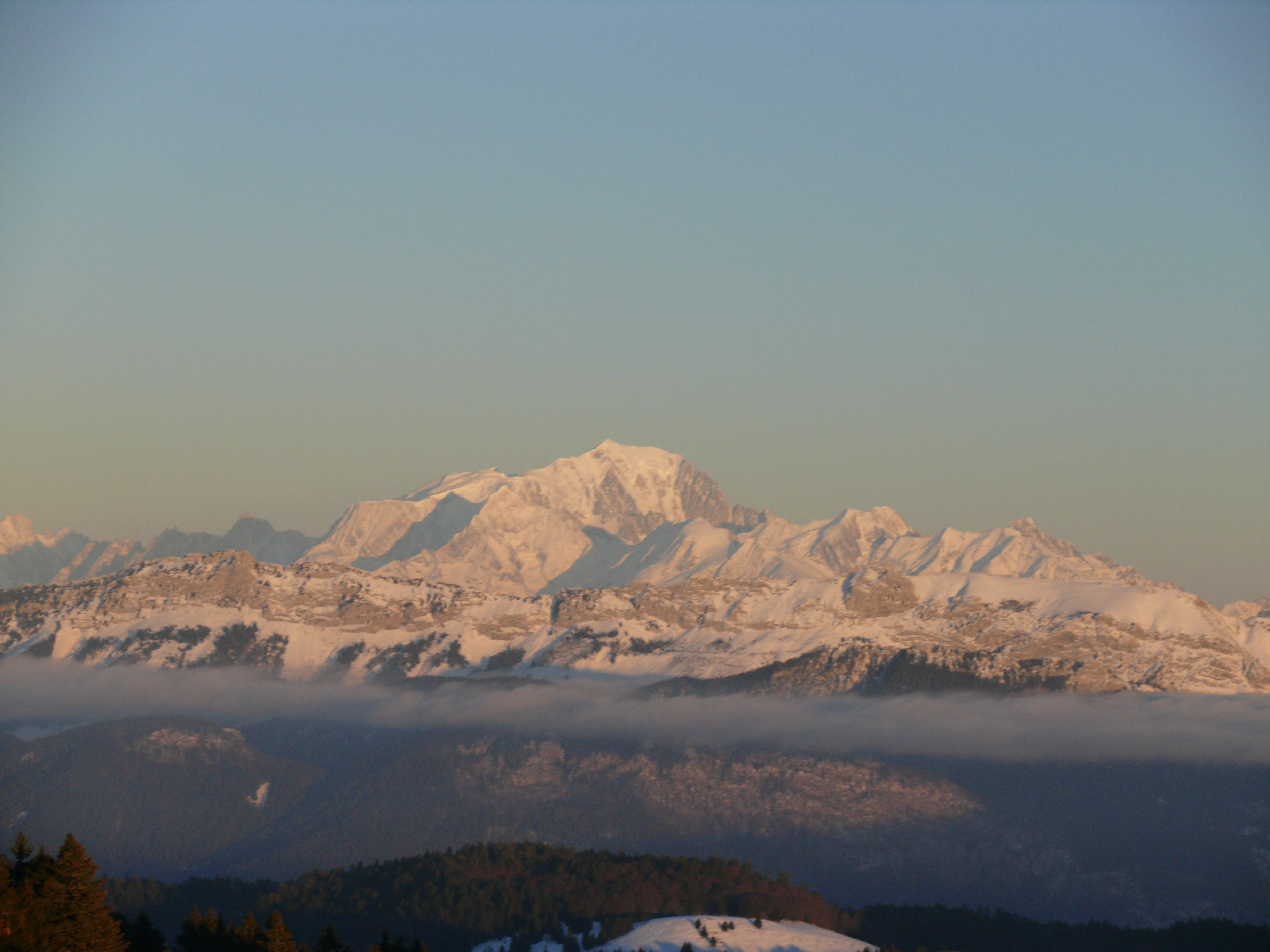 Massif de Mont Blanc vu depuis le Bélvedére du Mont Revard